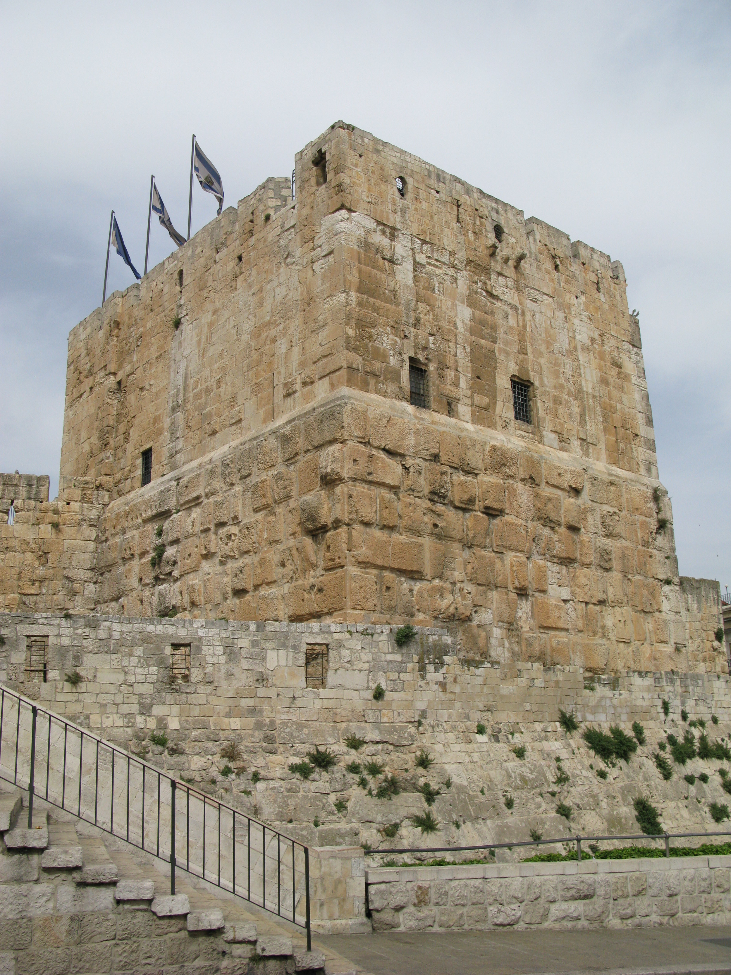 Jerusalem 047 Jerusalem